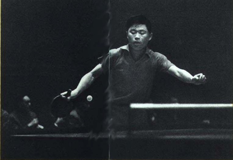 1965-01 徐寅生